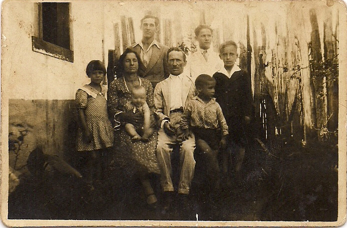 Fotografia de uma família de caipiras brancos em Penápolis, interior do Estado de São Paulo, Brasil.